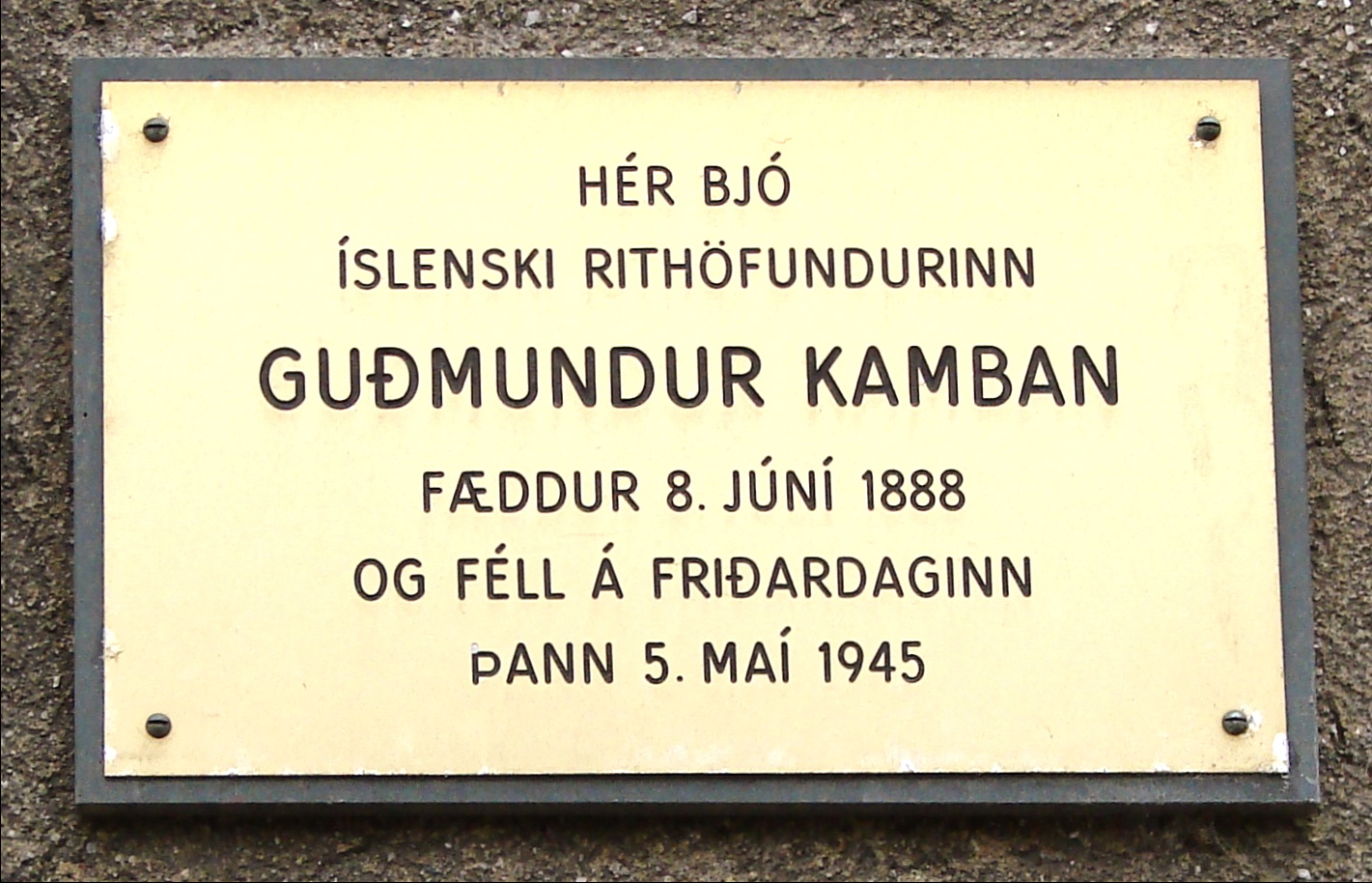 Mindeplade over forfatteren Guðmundur Kamban (1888—1945), Upsalagade, København